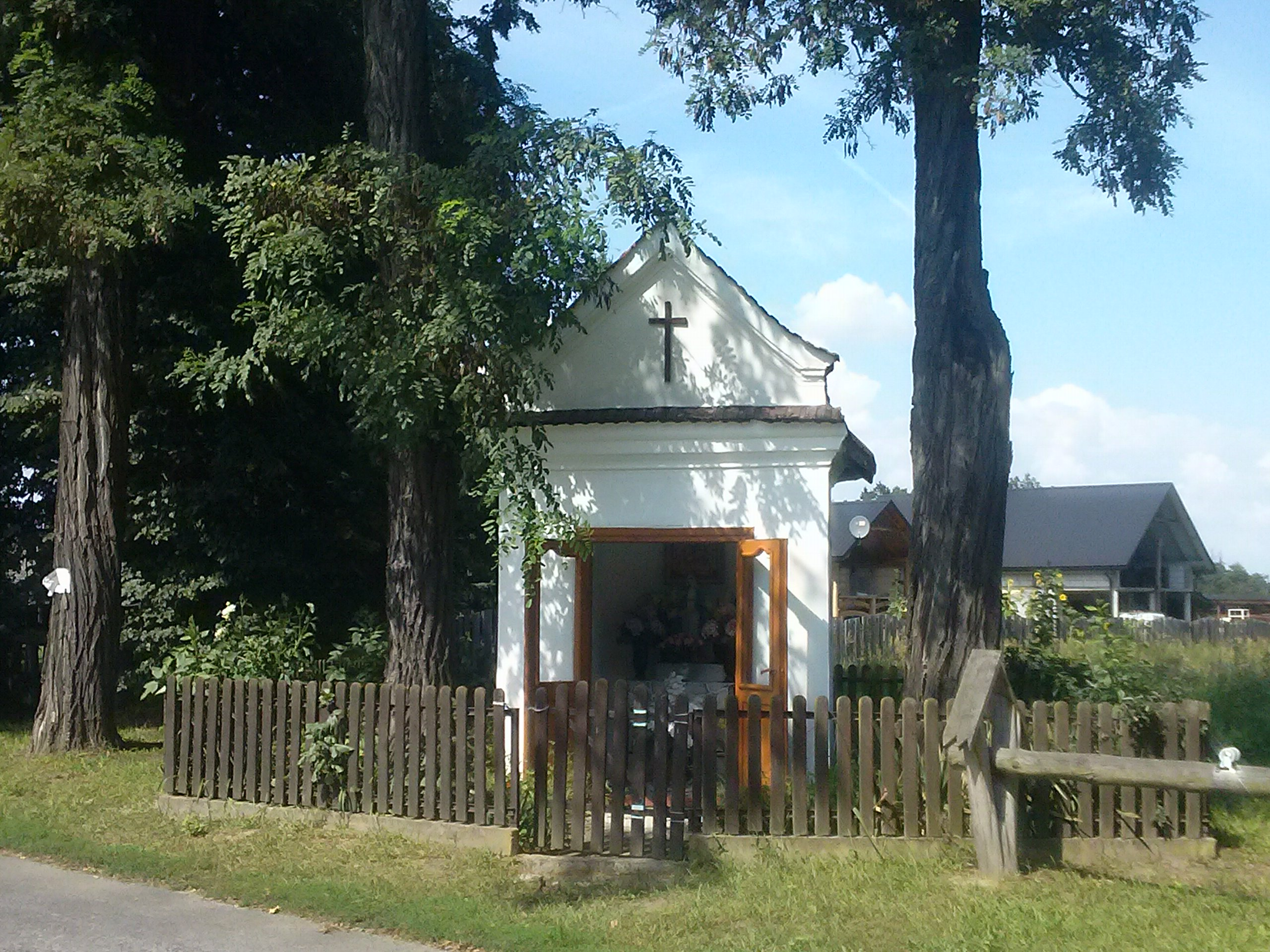 Kapliczka Matki Bożej w Gniewczynie Trynieckiej (Białobrzeżki)